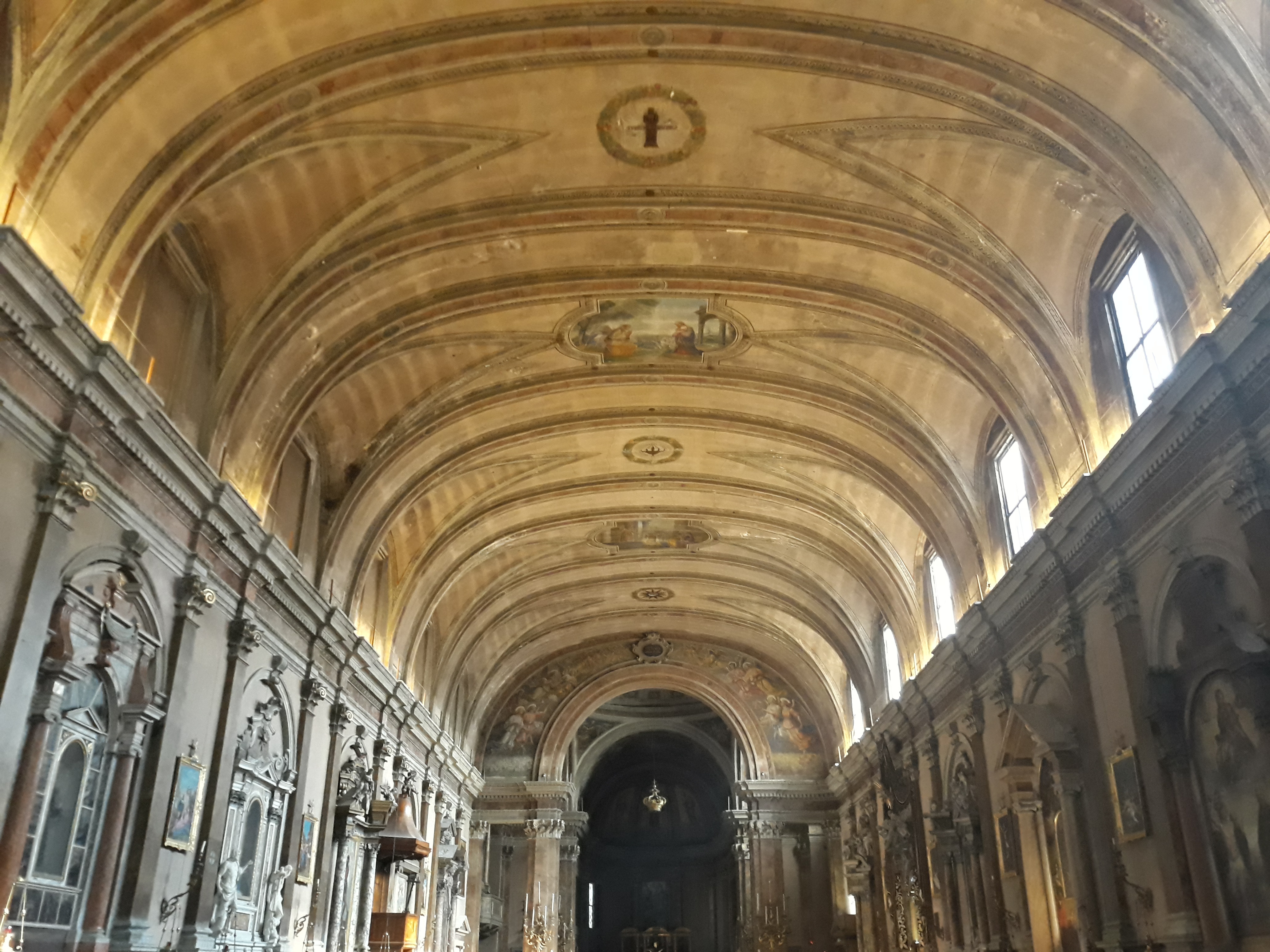 Interno della chiesa di Sant'Eufemia a Verona